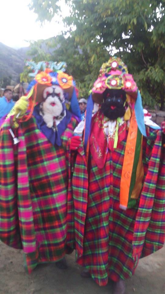 Esta foto es tomado en una fiesta por mi persona, la misma foto tiene un primo llamado Clemente toribio.